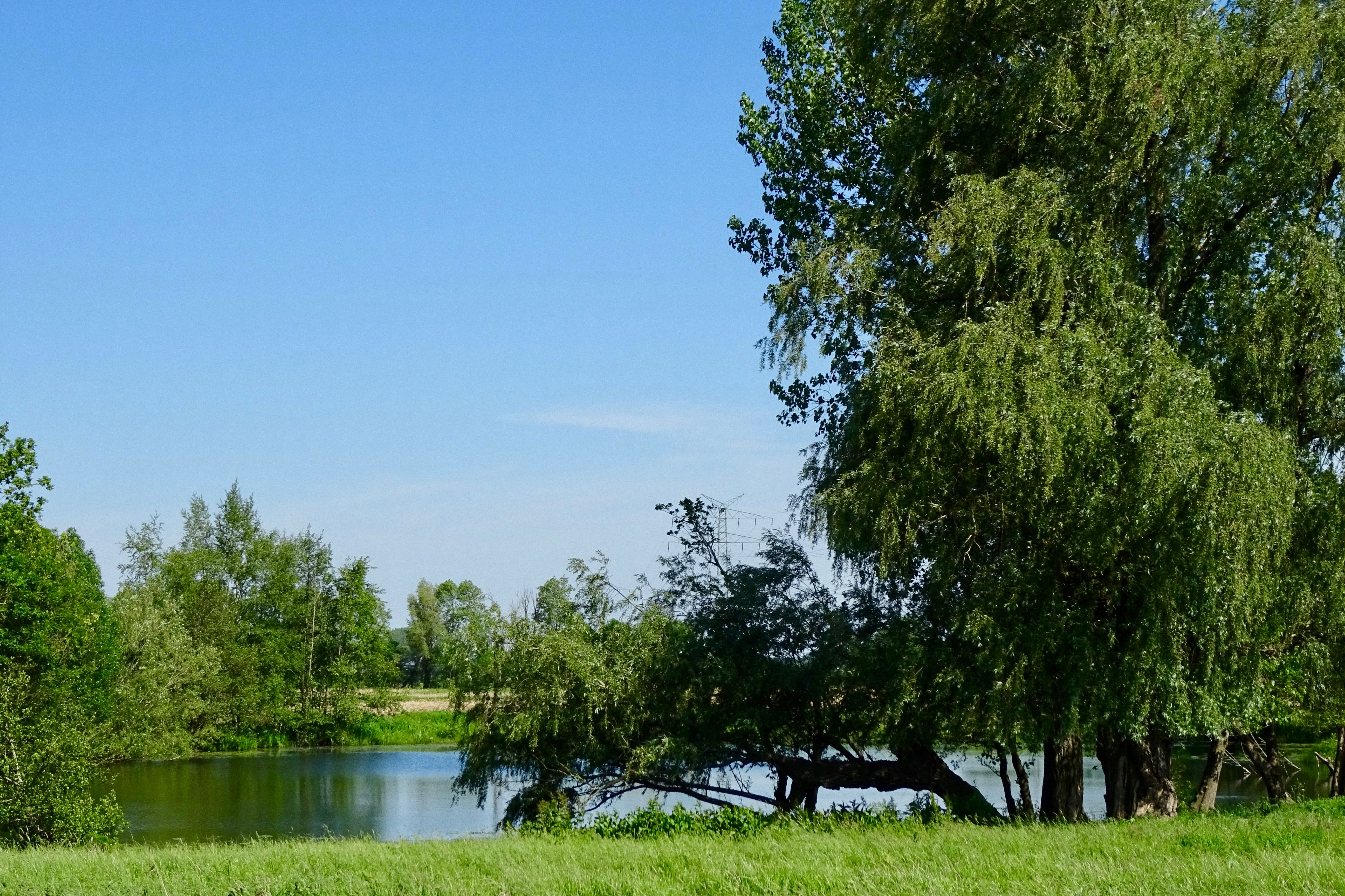 meer nabij Halte aan de Ems aan de overzijde van Papenburg